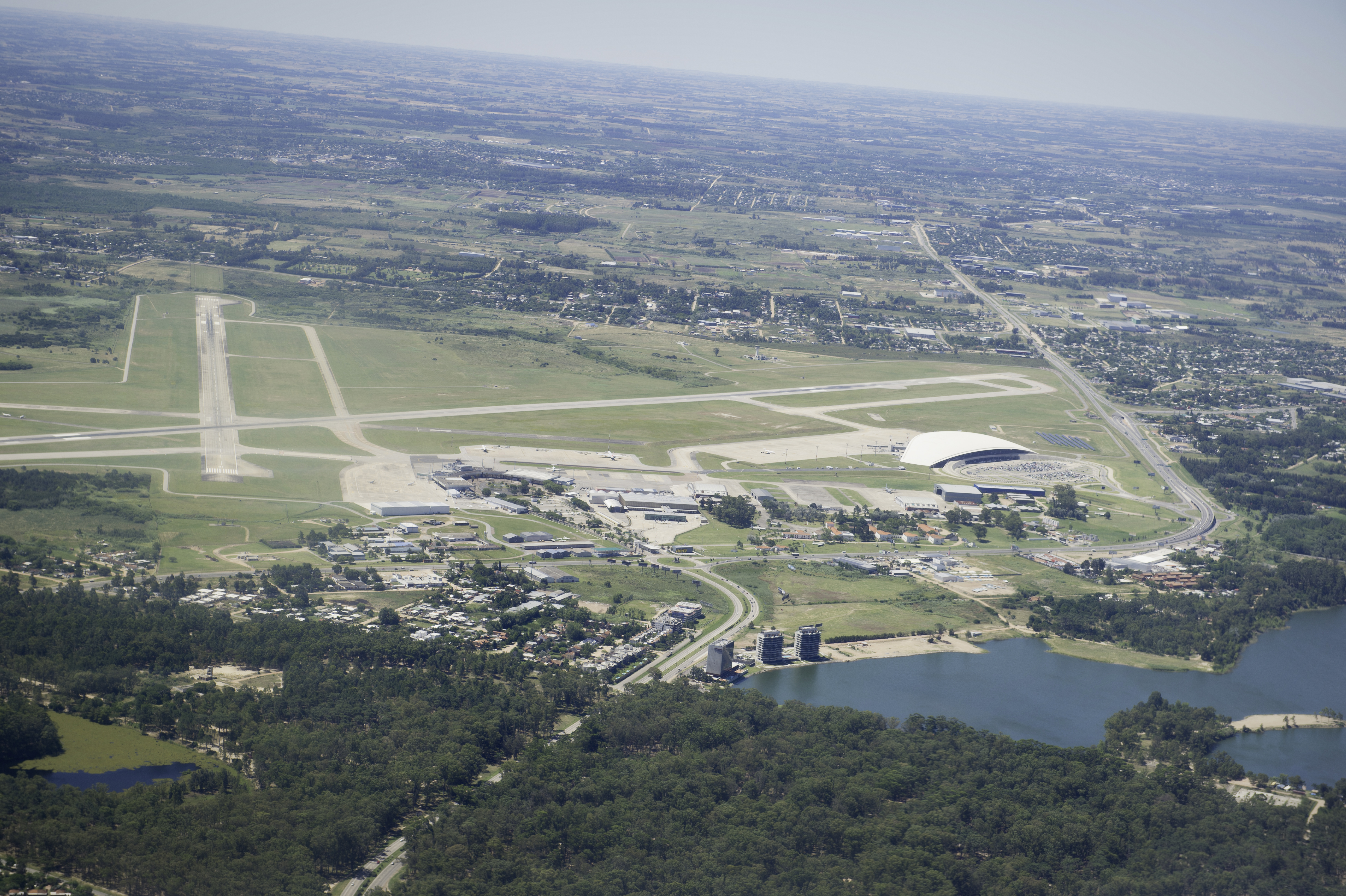 Aeropuerto Carrasco, toma aérea.